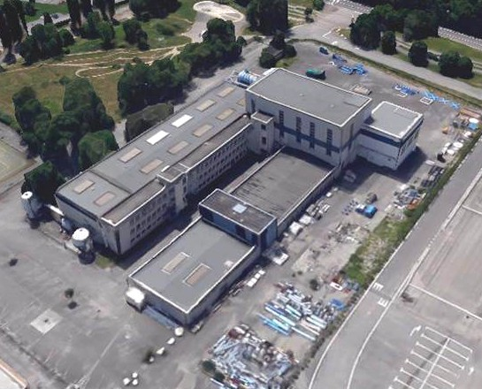 Vue des locaux du CERG situés à Pont-de-Claix (38)